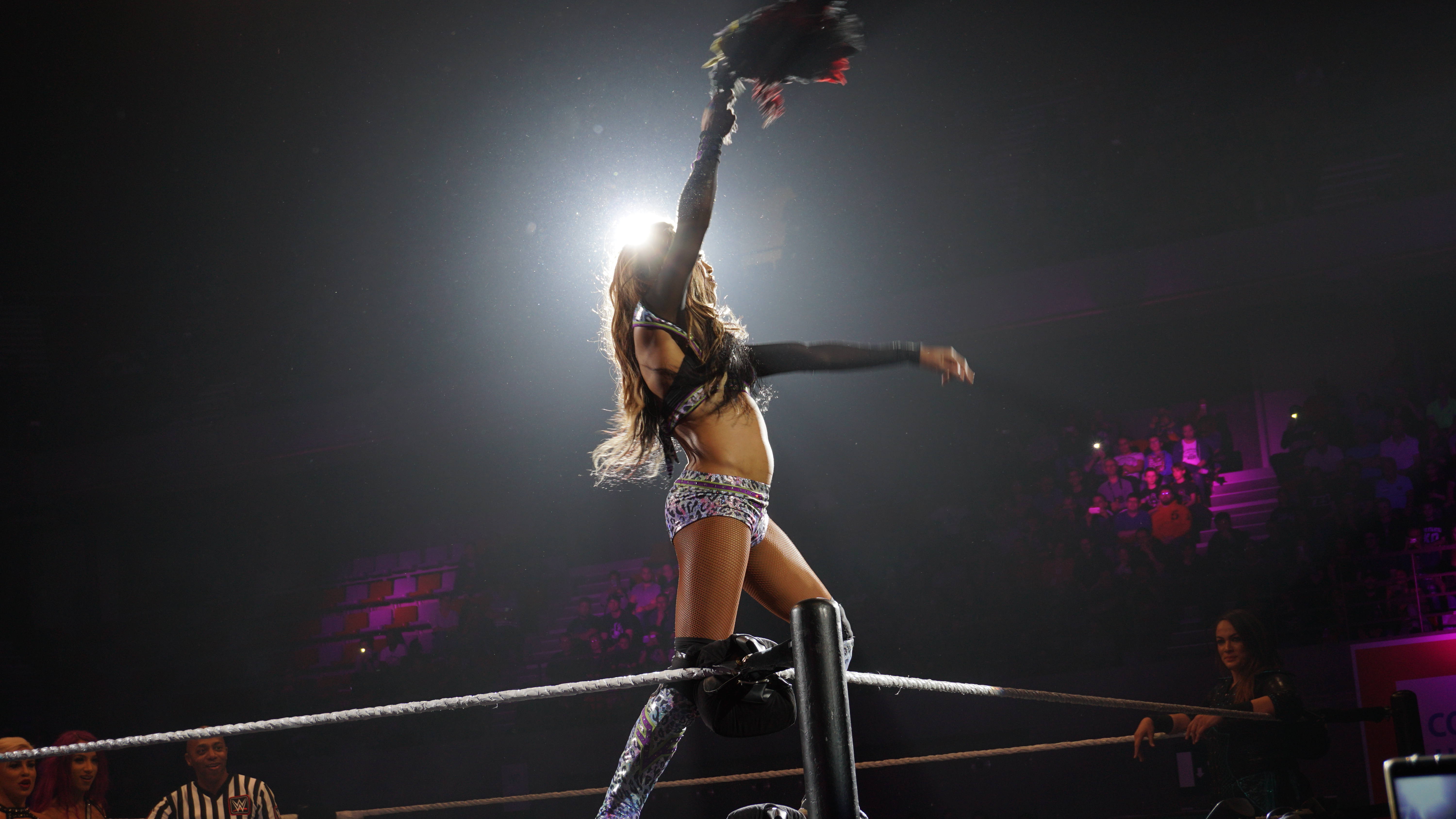 Dana Brooke & Sasha Banks defeat Alicia Fox & Nia Jax ( Le vendredi 12 mai, la WWE Live Tour fera escale au Country Hall a Liege pour le spectacle de catch de l'annee! Au programme: des duels impitoyables et des rencontres captivantes entre les meilleures equipes et les plus grands rivaux. )